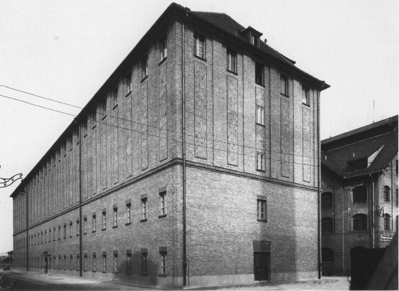 Schlachthof: Fleischgroßhandelshalle, Architekten: James Bühring und Hubert Ritter.Das Gebäude diente der Lagerung des Fleisches. Im Keller des Gebäudes befanden sich die Gefrierräume. wobei das Erdgeschoss und das 1. Obergeschoss dem Verkauf vorbehalten war.